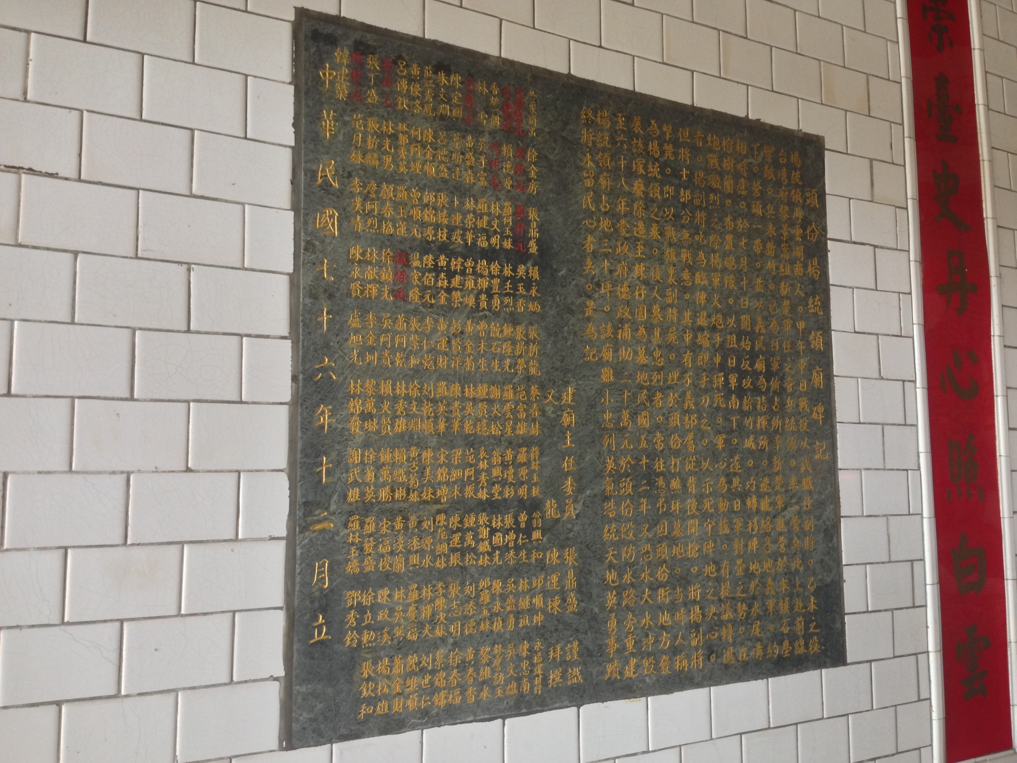 頭份楊統領廟碑記